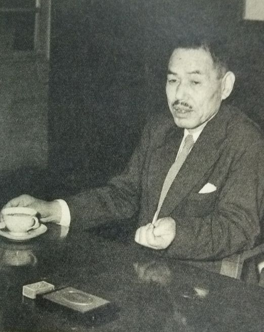 山田晁